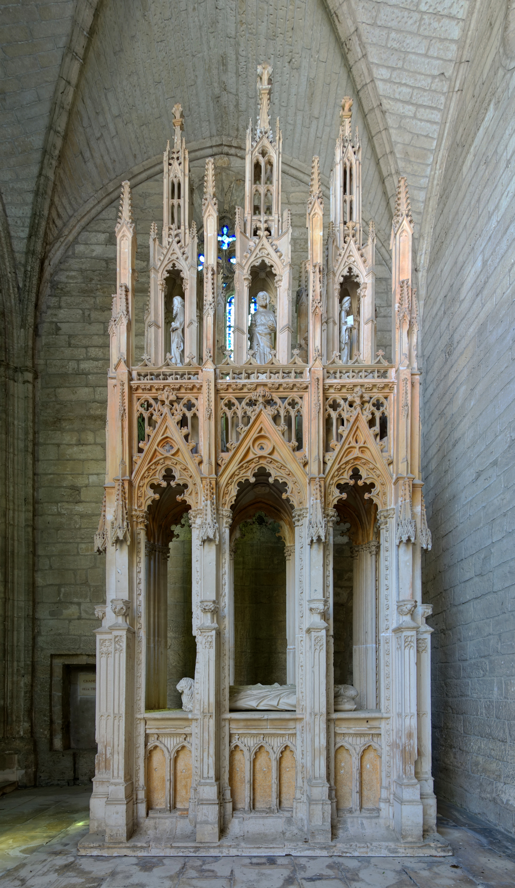 Mausolée d'Innocent VI dans la Chartreuse du Val de Bénédiction à Villeneuve-lès-Avignon.